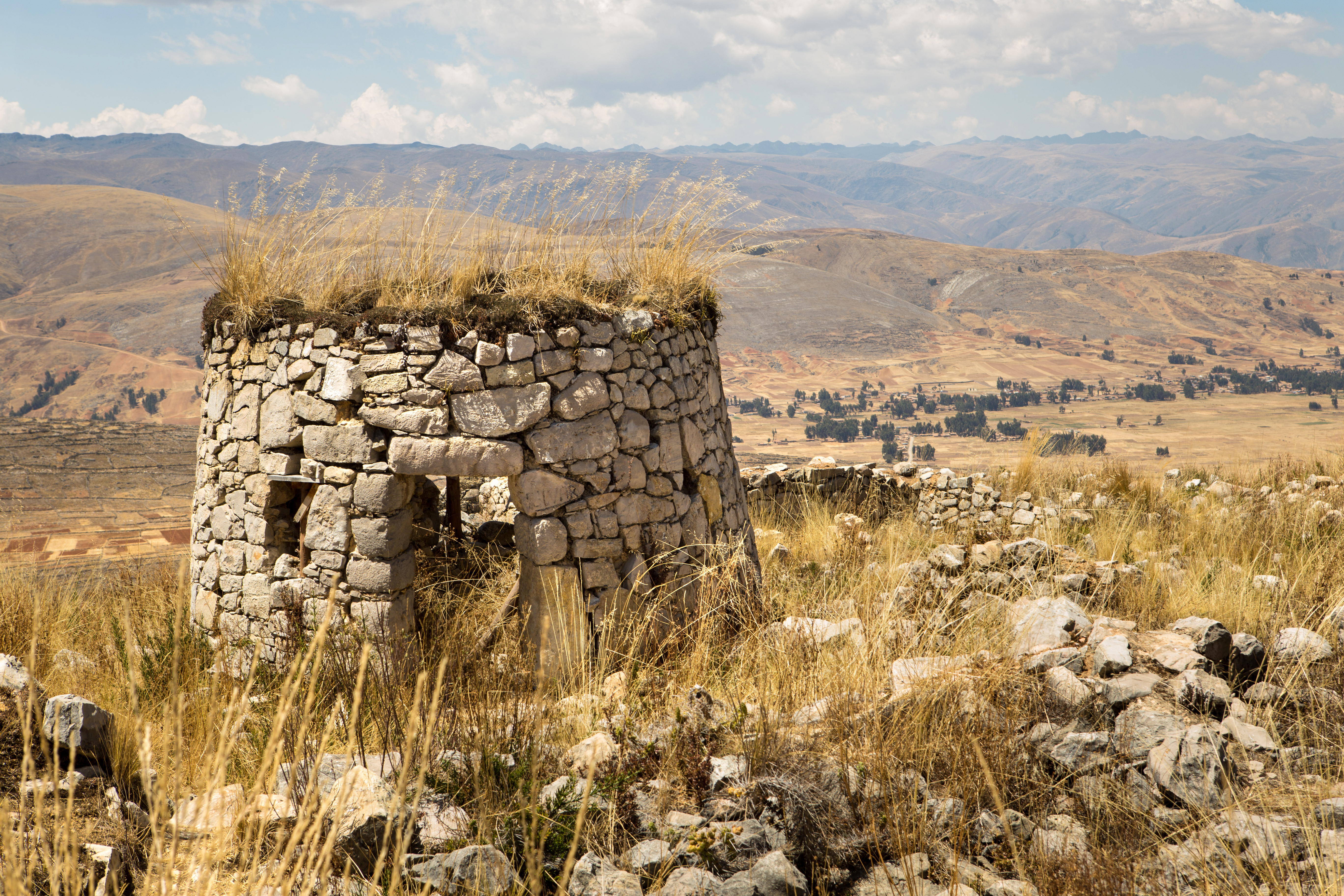 Vivienda circular en el complejo arqueológico de Tunanmarca